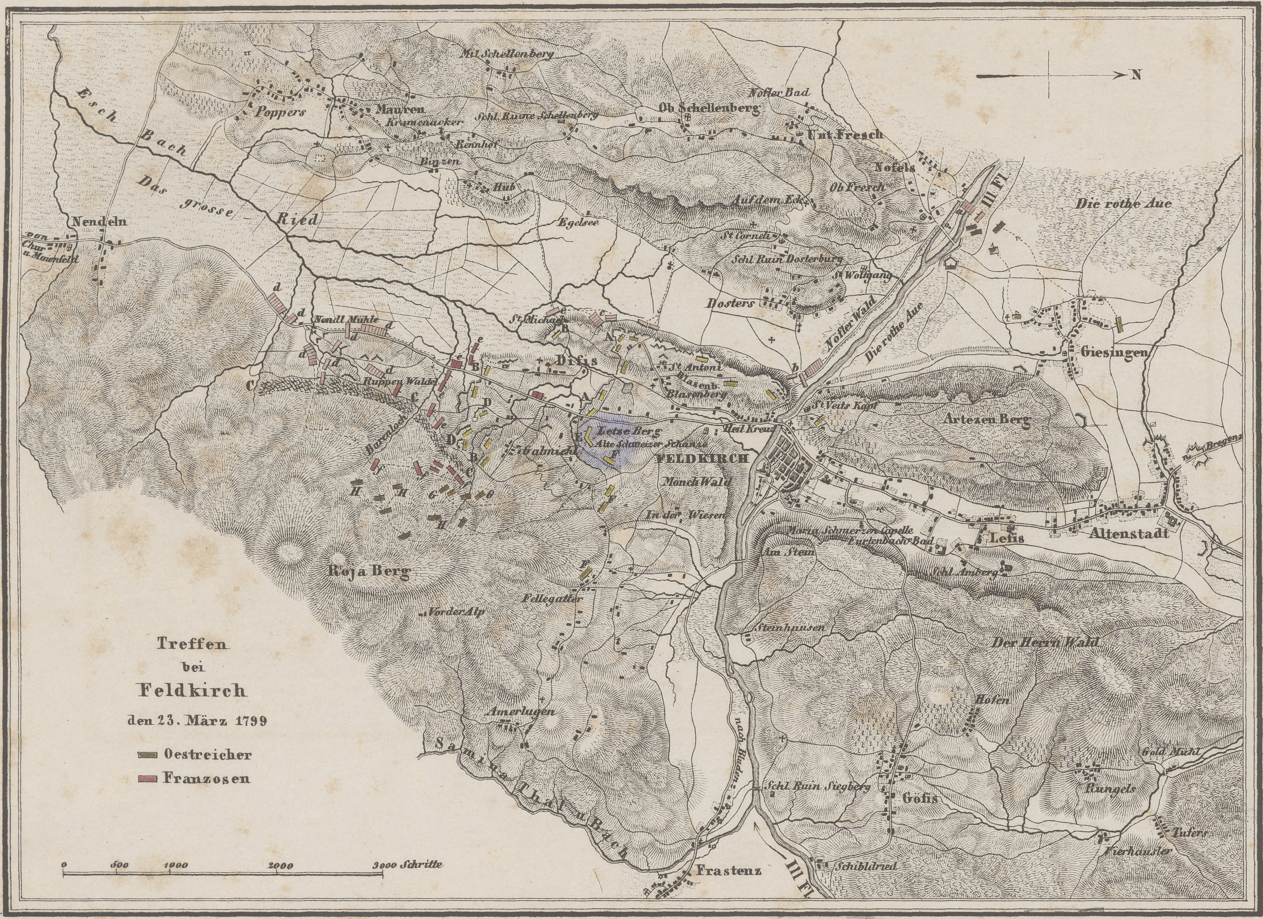 Plan der Schlacht bei Feldkirch